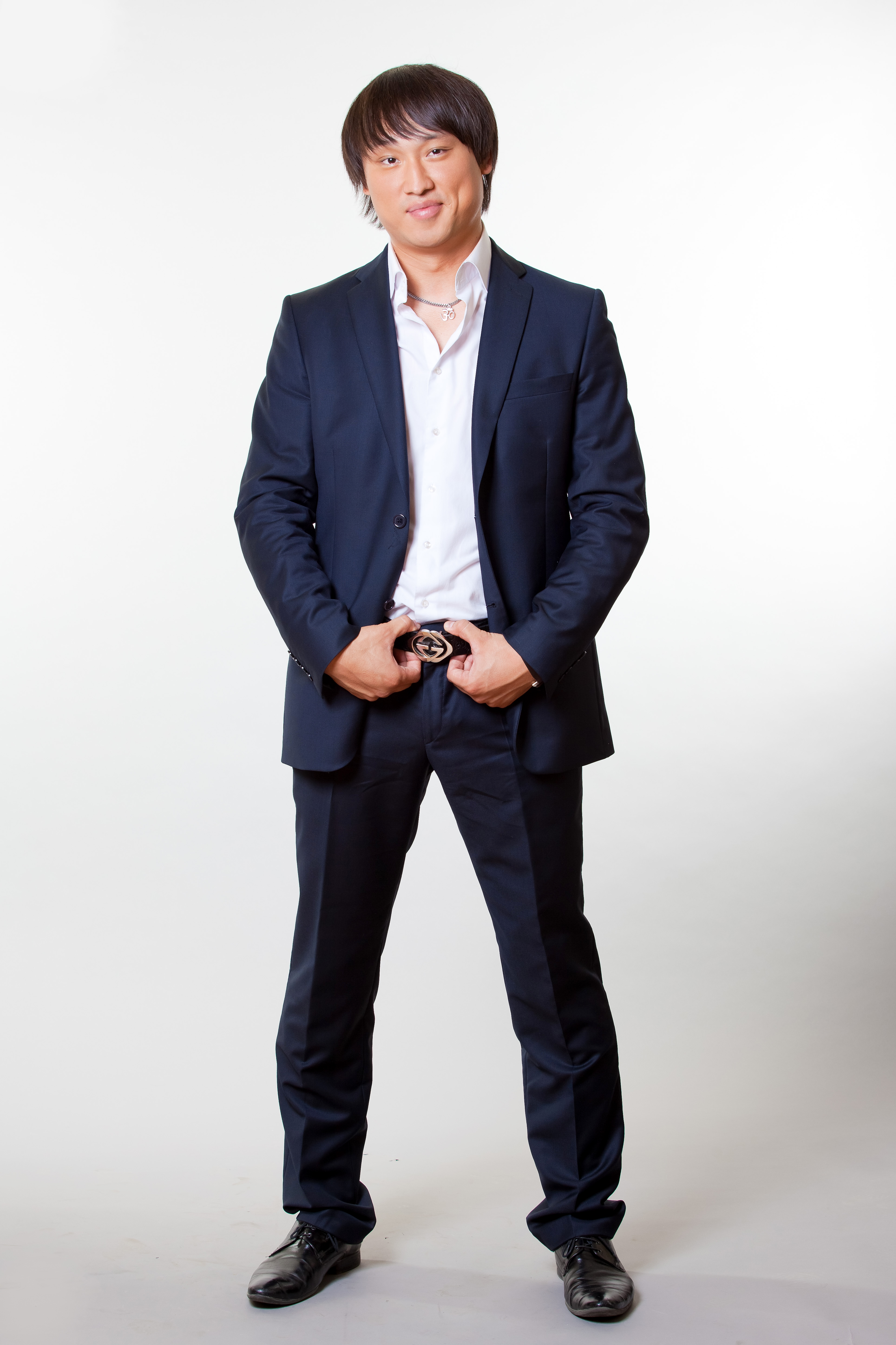 Капитан команды КВН РУДН, генеральный продюсер «YBW GROUP», продюсер «FIGHT NIGHTS».